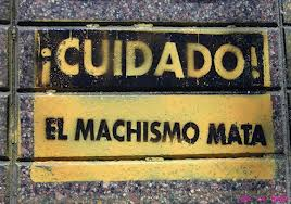 Es un anuncio de machismo